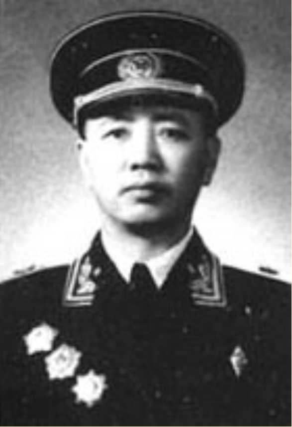 刘华清1955年被授予海军少将军衔。